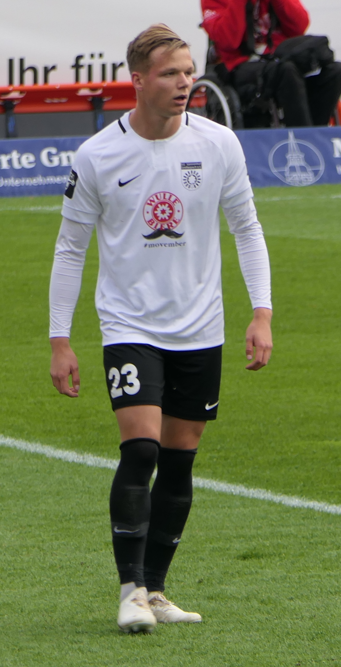 Der Fussballprofi Philipp Hercher im Trikot der SG Sonnenhof Großaspach beim Heimspiel gegen Eintracht Braunschweig am 03.11.2018.